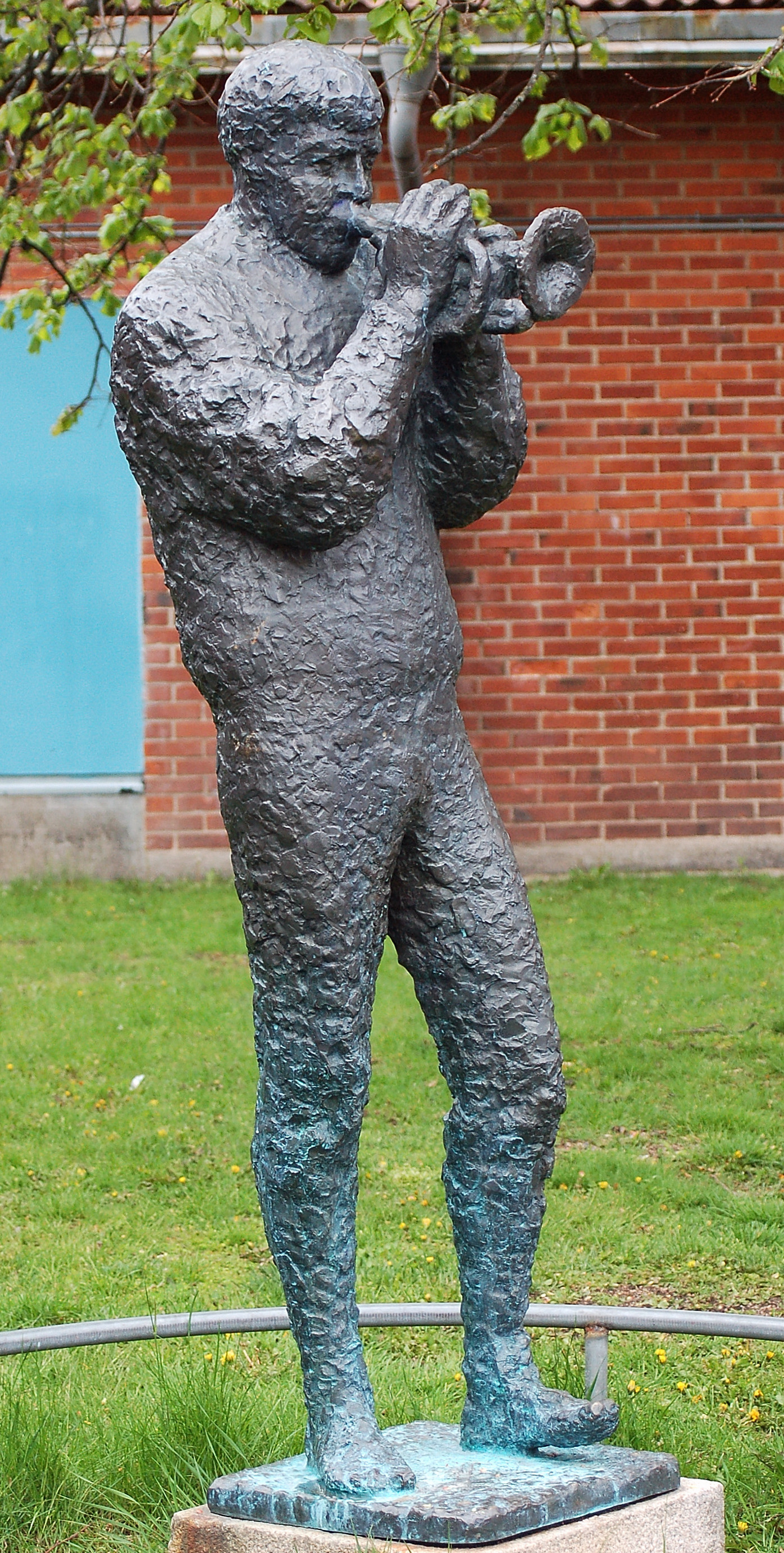 "Ragtime" av Niklas Göran utförd 1962 i brons placerad utanför Norrstrandsskolan, Karlstad.